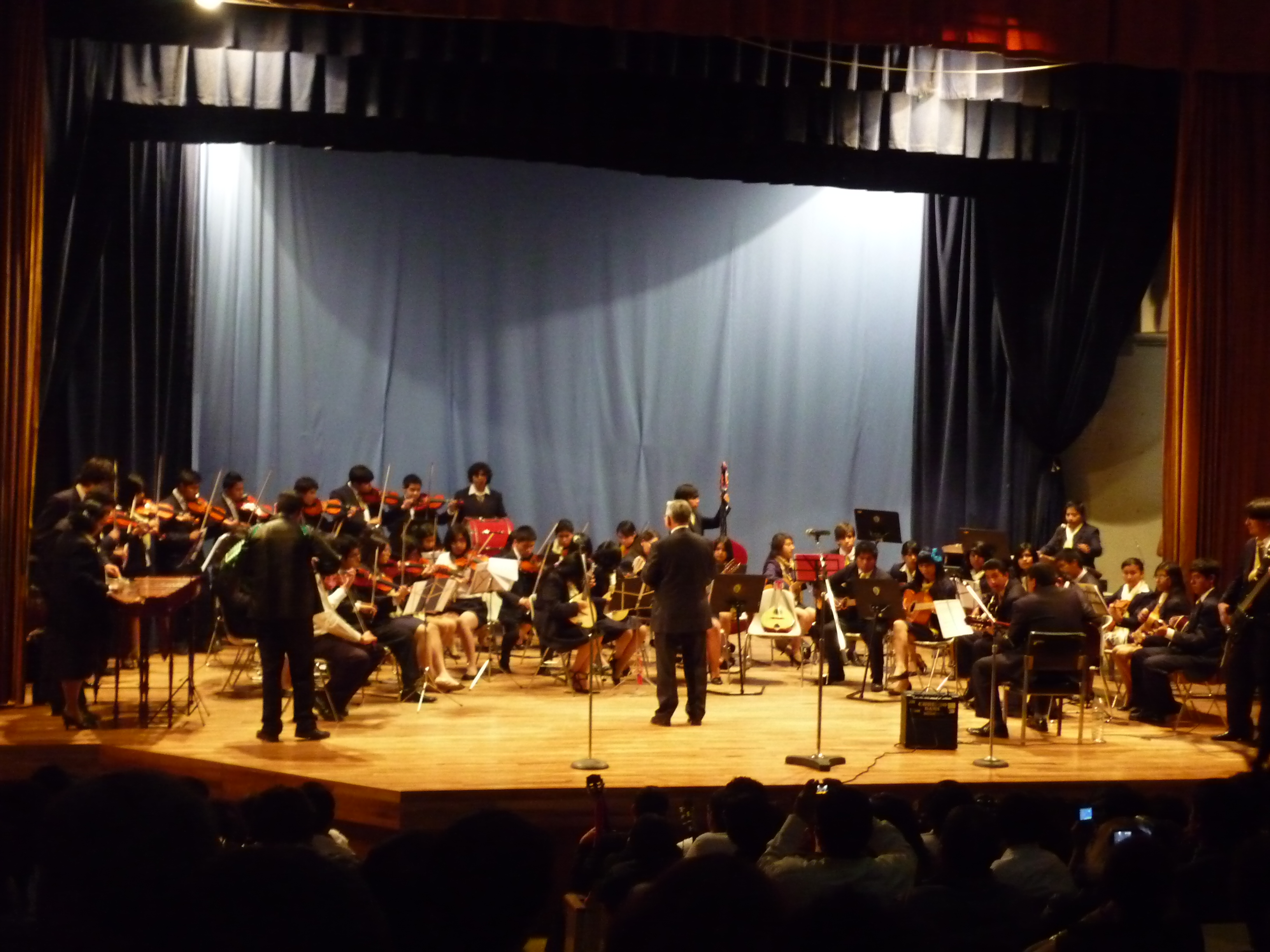 Concierto de la Orquesta Típica Xochiquetzalli en el auditorio del plantel.